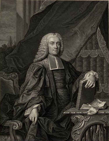 Nicolas René Berryer (1703-1762)